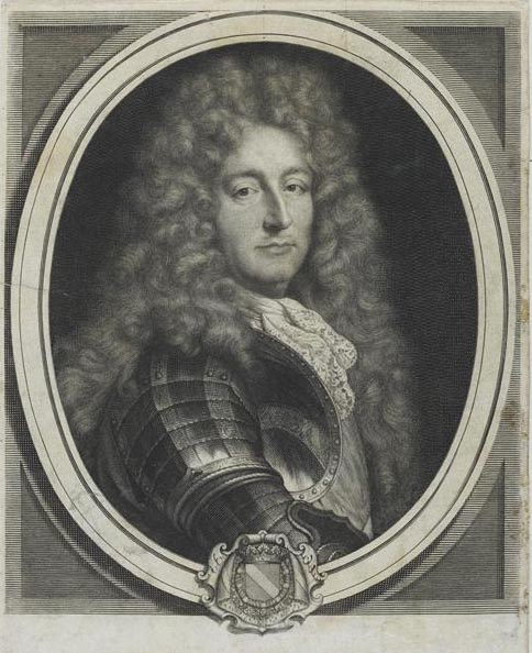 Portrait d'Anne Jules de Noailles (1650-1708), comte d'Ayen puis 2e duc de Noailles en 1678, maréchal de France.